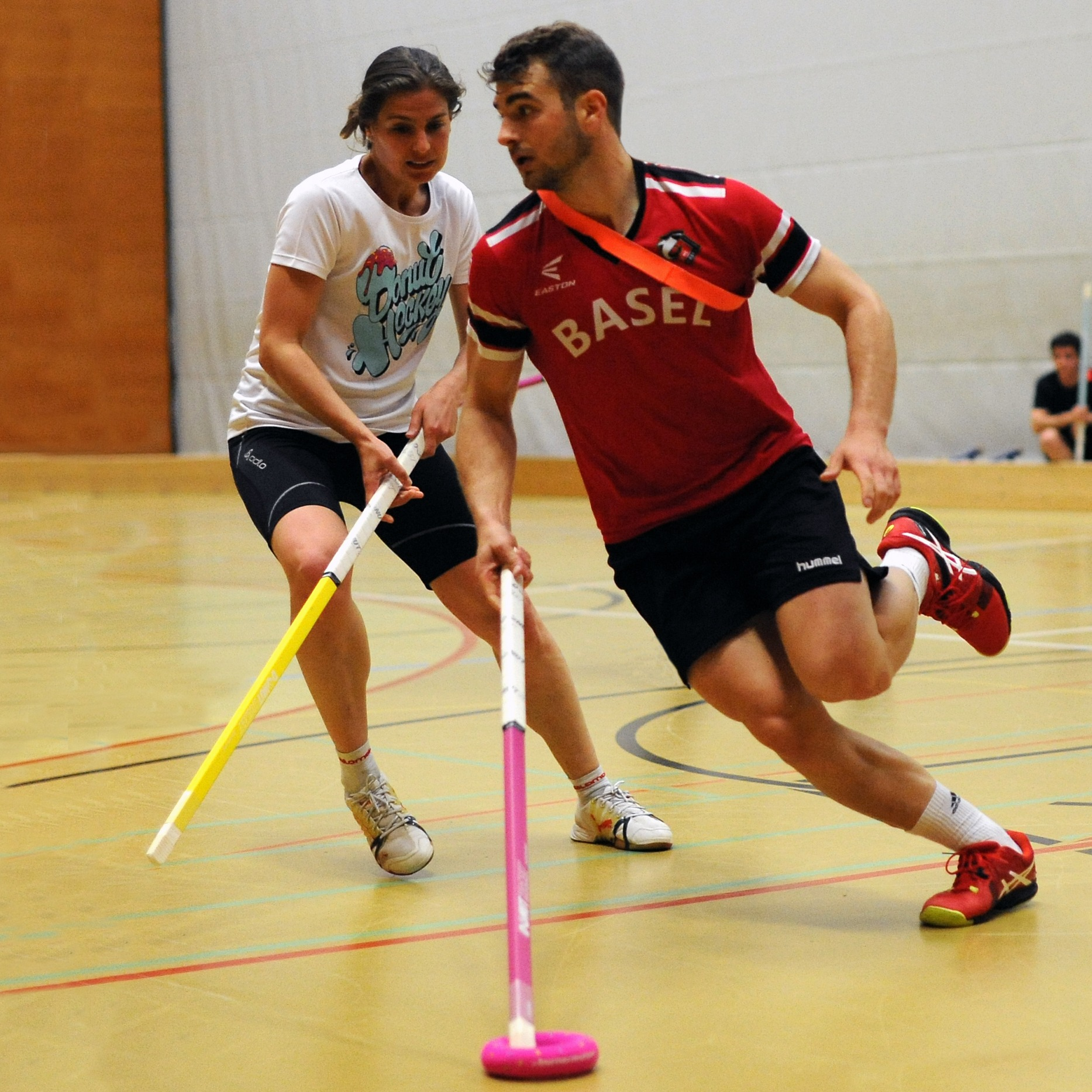 Donut Hockey-Zweikampf zwischen Frau und Mann